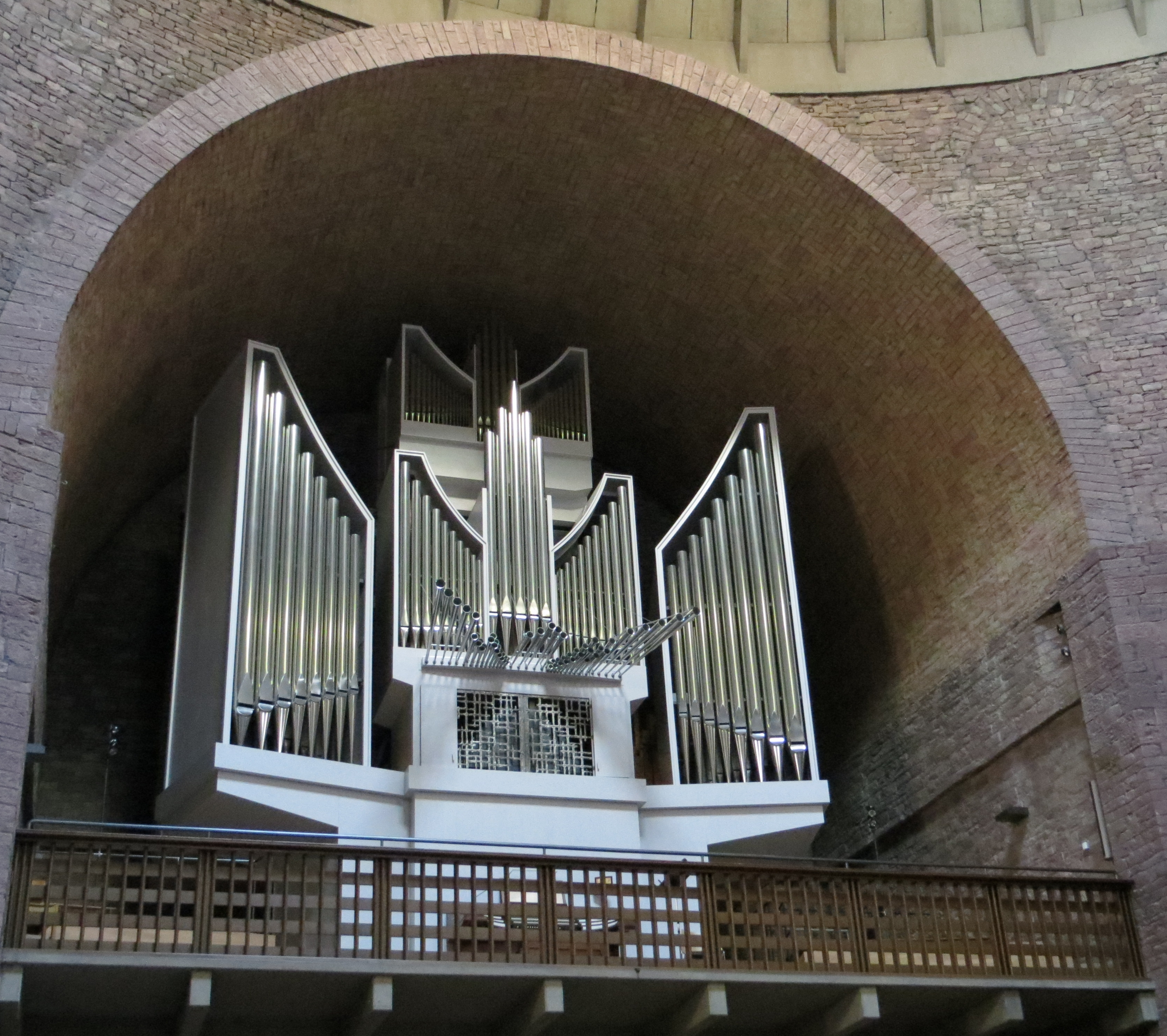 St. Stephan (Karlsruhe) Orgel